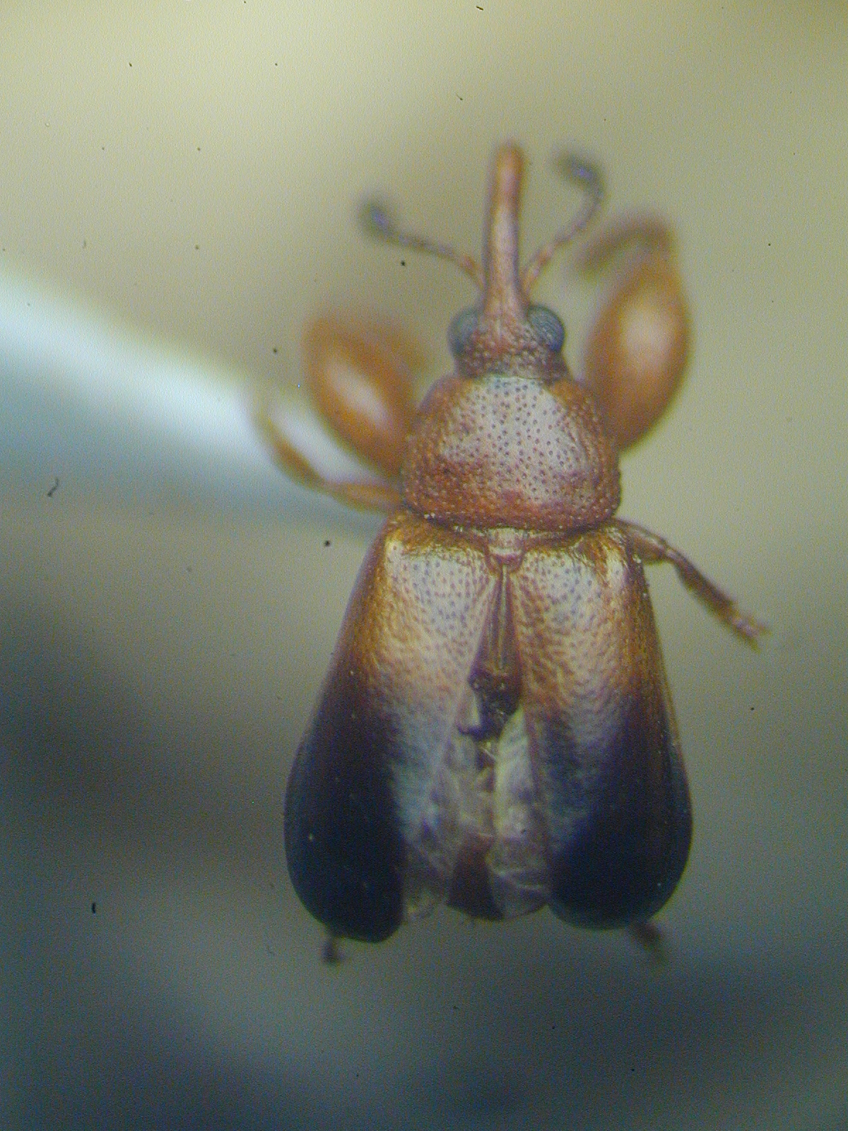 Rhopalotria dimidiata (Coleoptera:Curculionoidea:Belidae), male. From Cuban Zamia